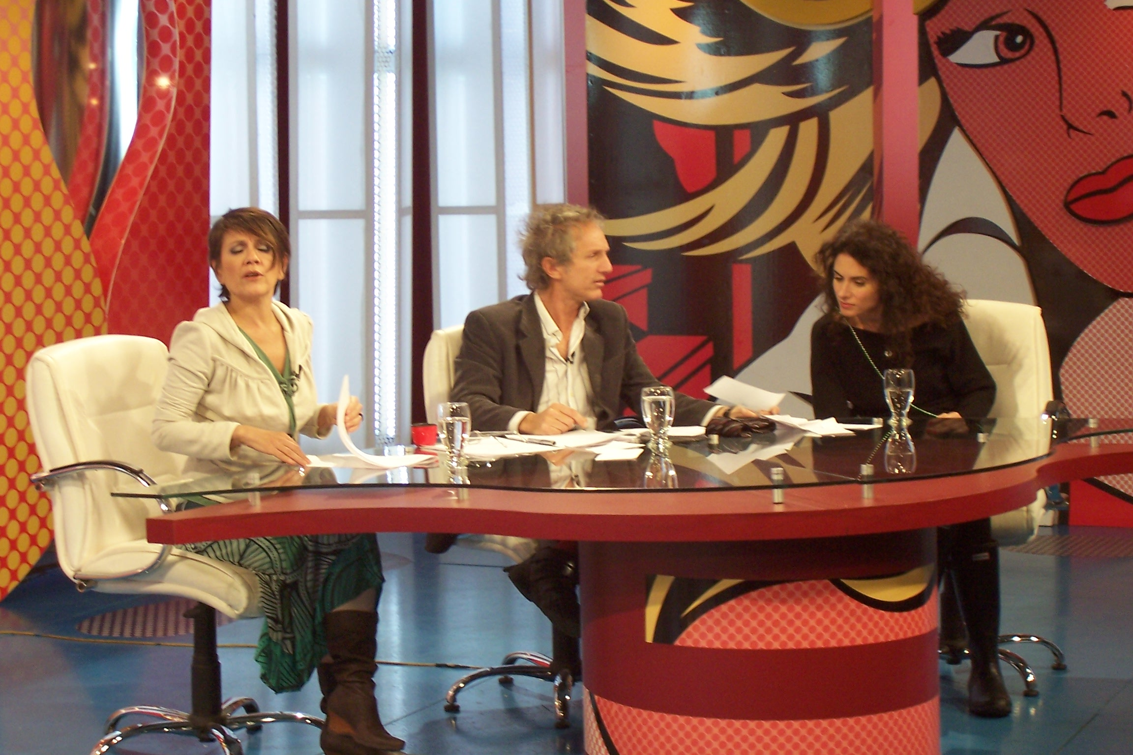 Déjamelo Pensar, programa emitido en vivo de Lunes a Viernes a las 16 hs por Canal 7 Argentina. Es conducido por el actor Boy Olmi y la periodista Sandra Russo. Agradecimientos: Hugo Barcia, Subgerente de Relaciones Institucionales y Prensa. Canal 7 Argentina.